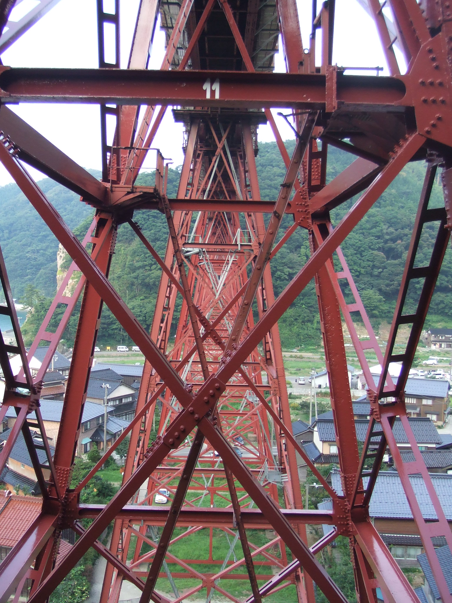 餘部鉄橋 橋脚の鋼材の様子